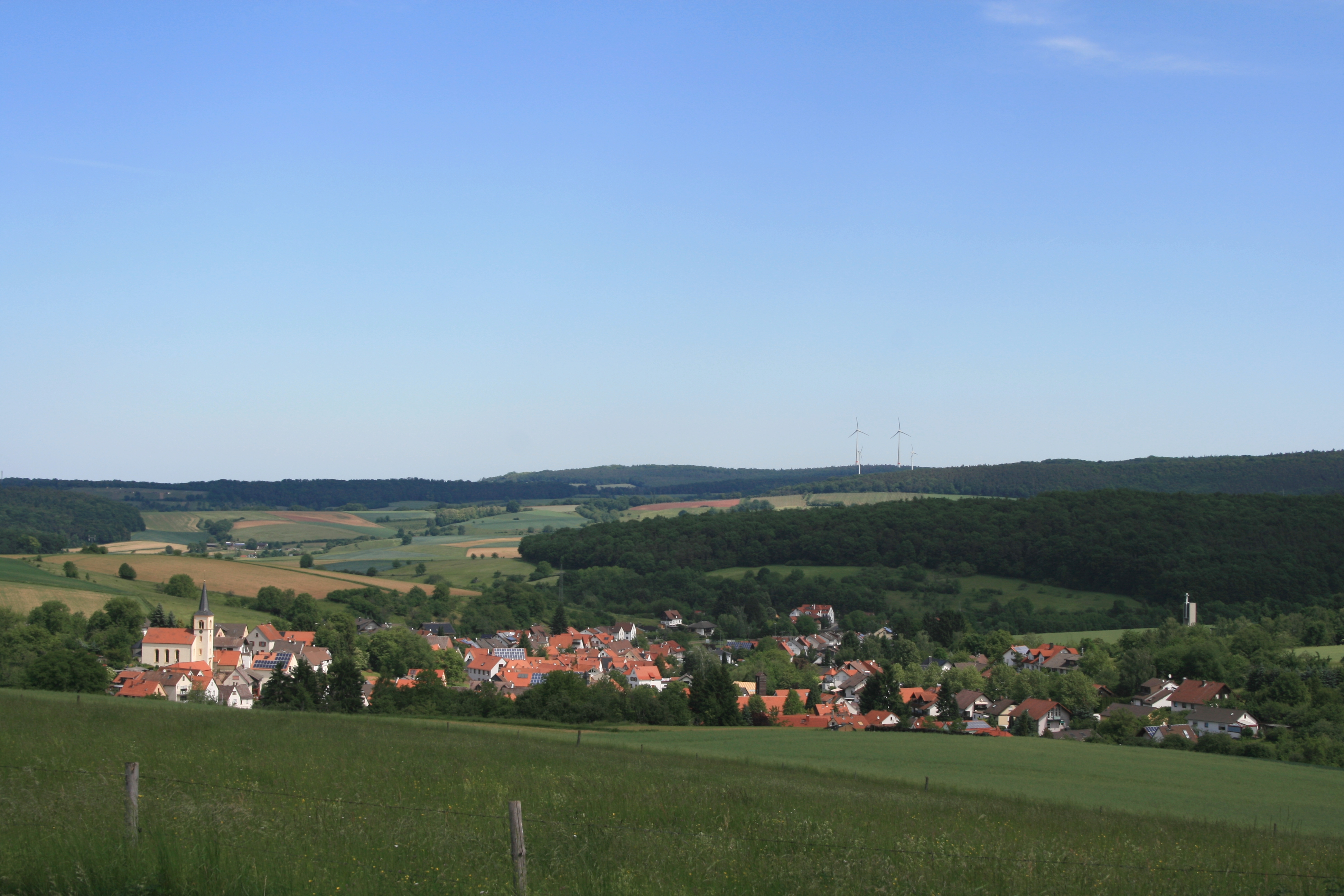 Blick auf Wiebelsbach von Süden.